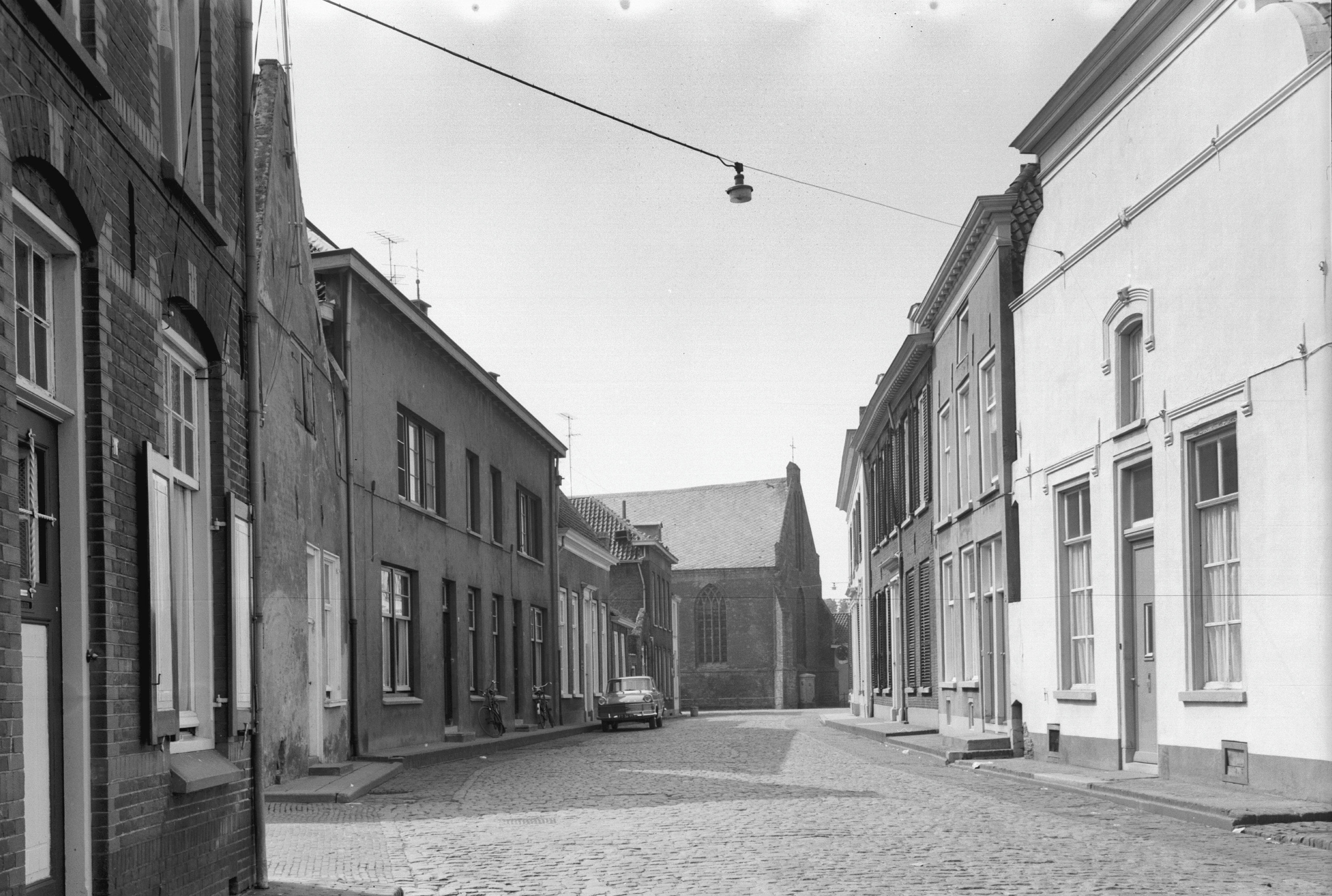 overzicht